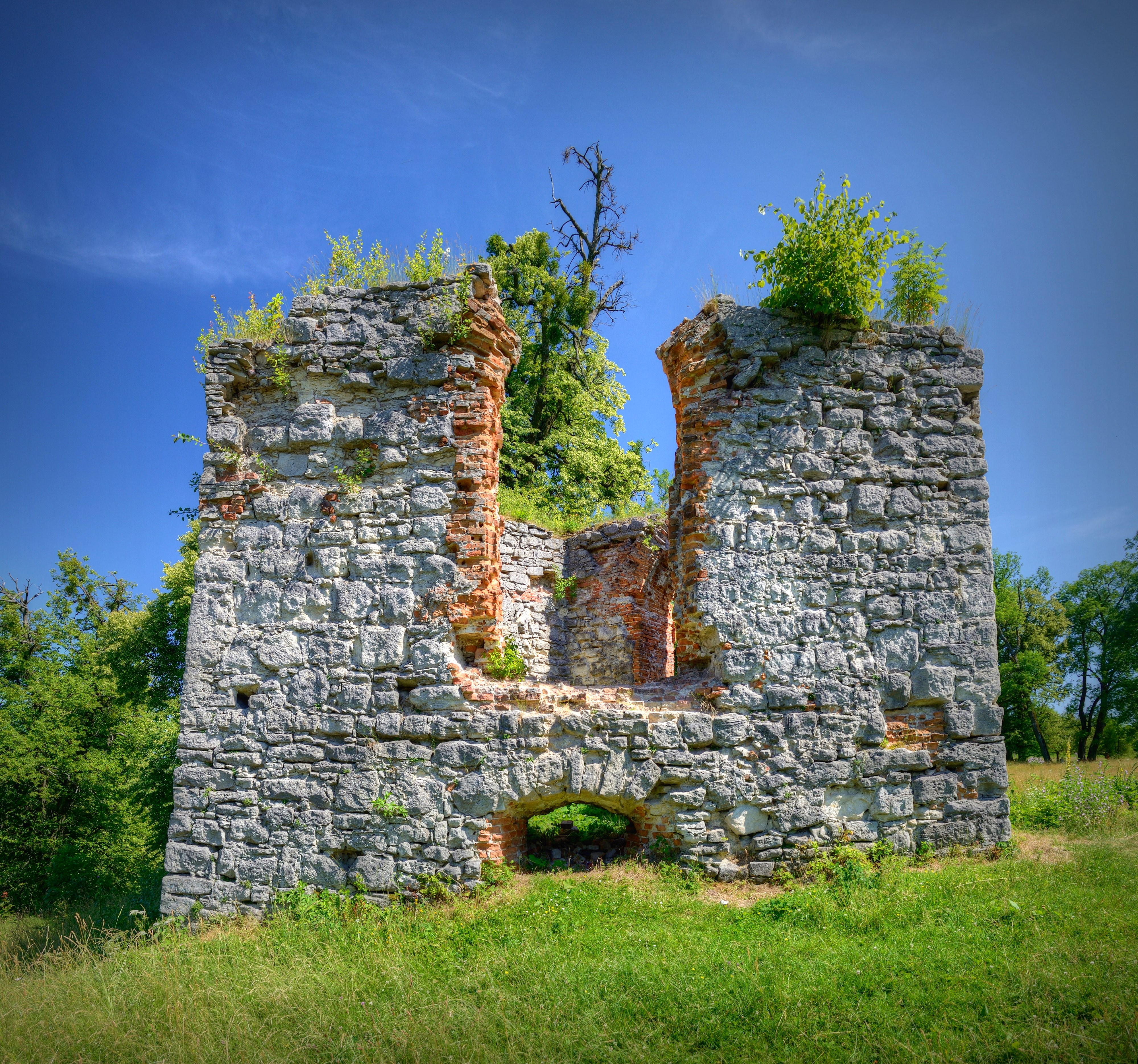 Руїни сторожової вежі біля замку